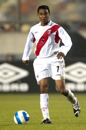 Nolberto Solano, mediocampista